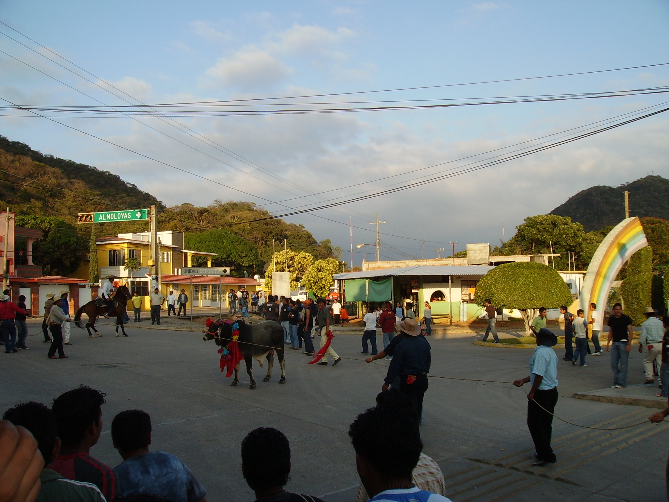 Tradicional Calenda del 12 de Diciembre en Lagunas Oaxaca